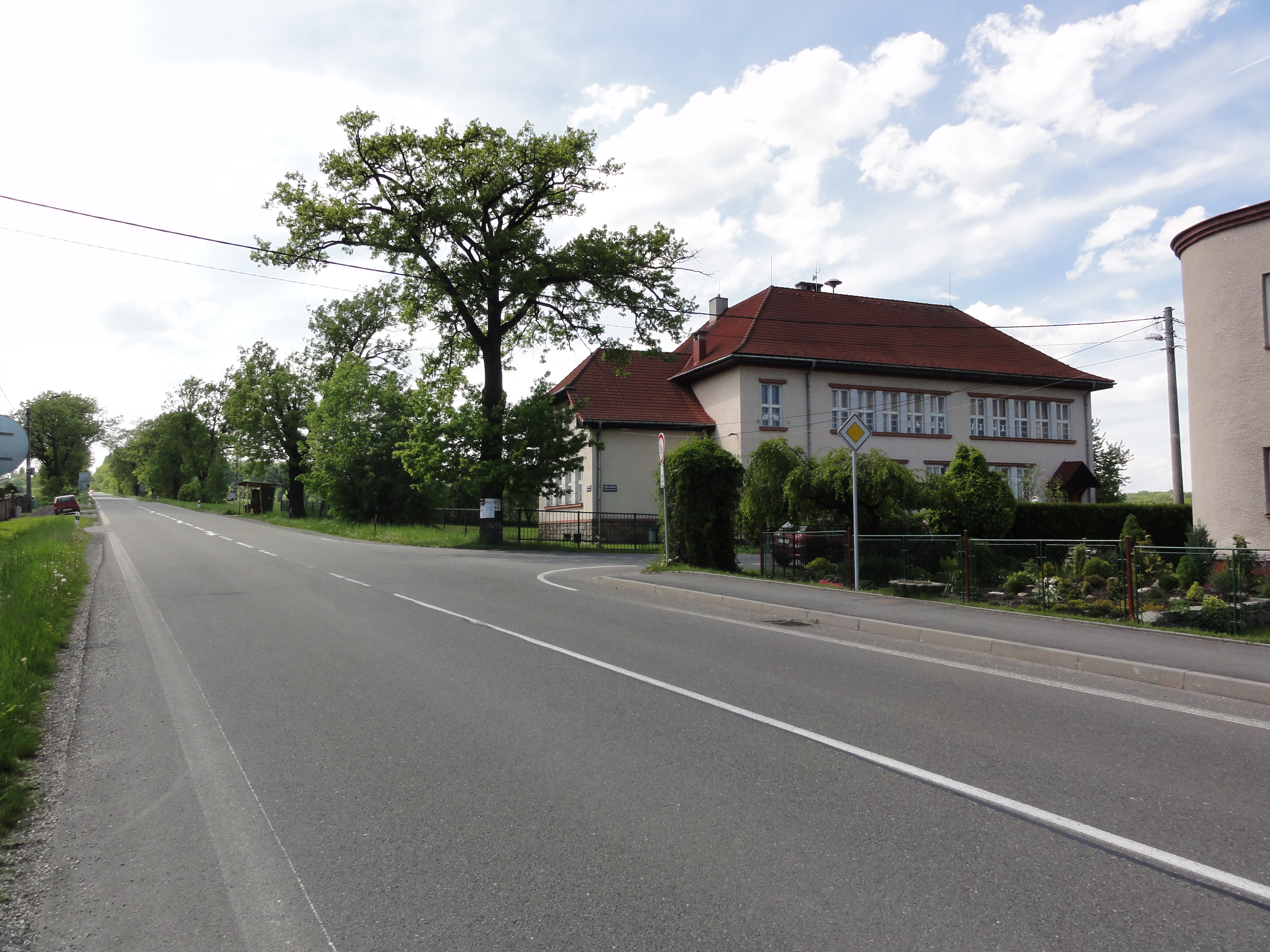 Czeski Cieszyn, Stanisłowice, droga I⁄11